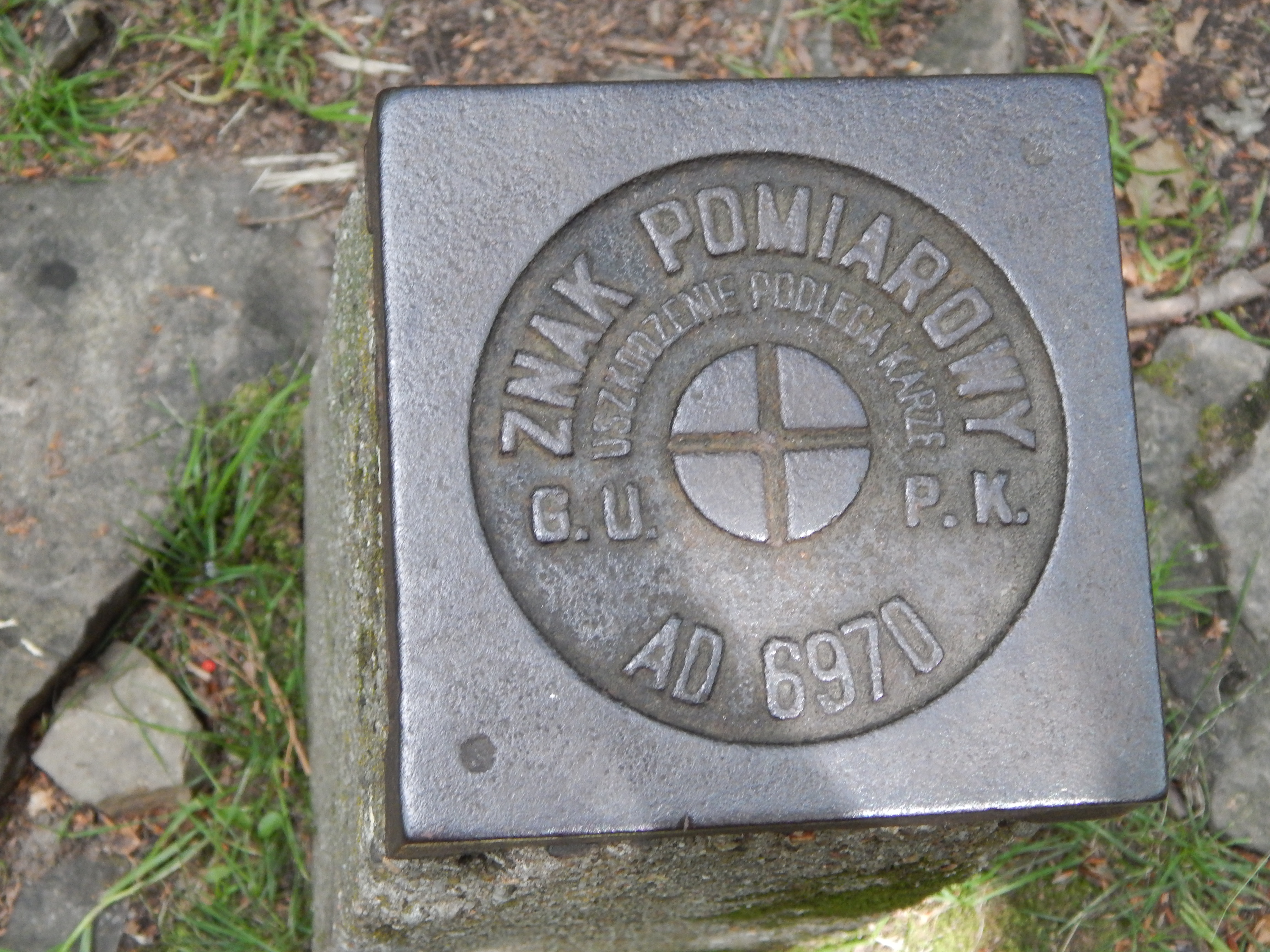 Znak pomiarowy znajdujący się na szczycie Wołosań